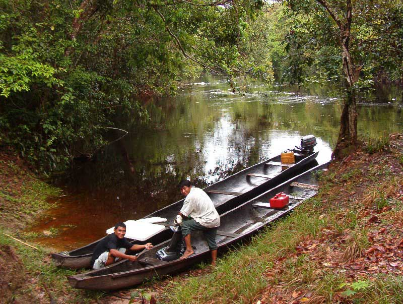 La Esmeralda (Taxis), Estado Amazonas - Venezuela (2002)